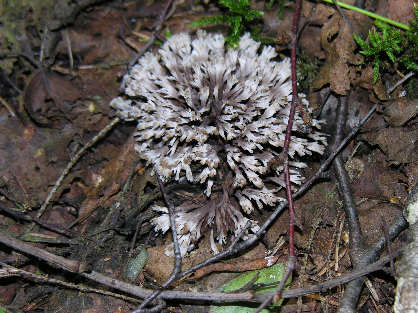 Blumen-Lederkoralle (Thelephora anthocephala (Bull.) Pers.), Lithuania